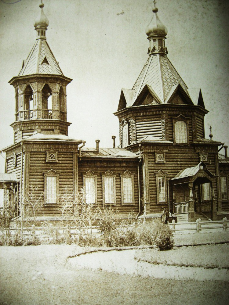 В поселке Магдагачи церковь была построена в 1910–1913 годах и освящена в честь святого Равноапостольного великого князя Владимира. Улица, на которой стоял храм, тоже называлась Свято-Владимирской. Частично снесена в 1929 году, окончательно в 1937 году.